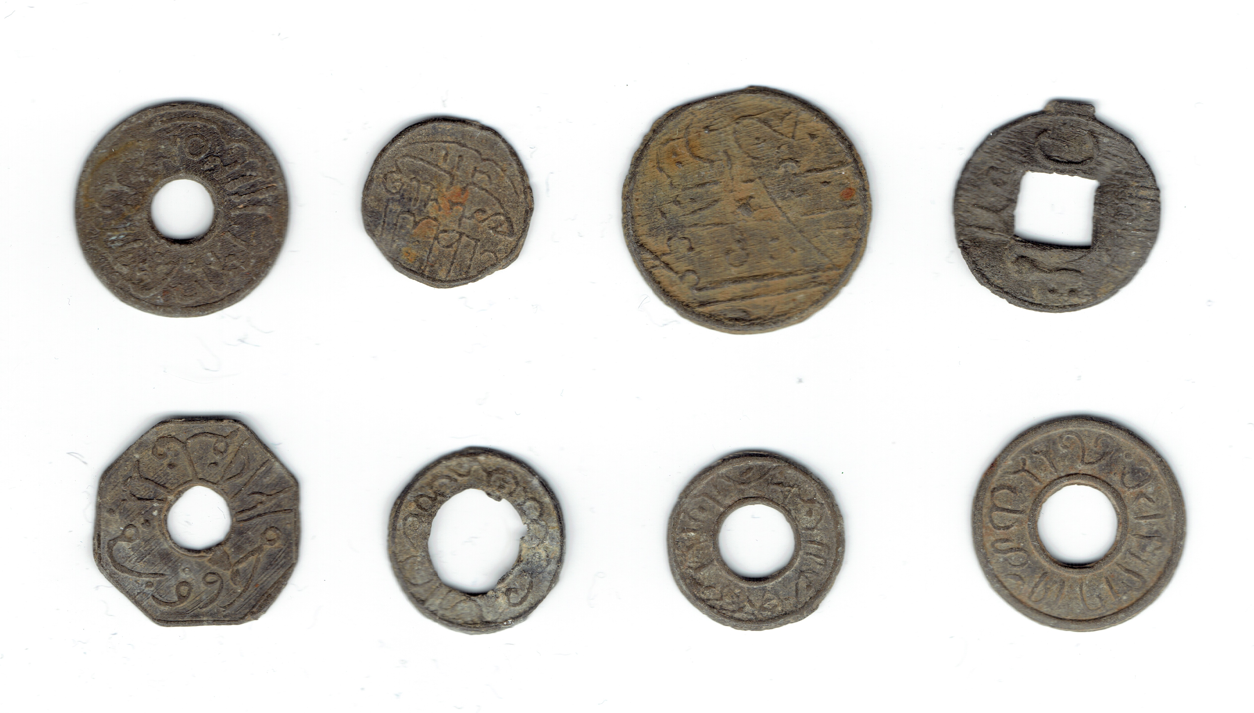 Muntjes uit het sultanaat Palembang. Scan van muntjes uit mijn eigen collectie. Keerzijde is onbeschreven